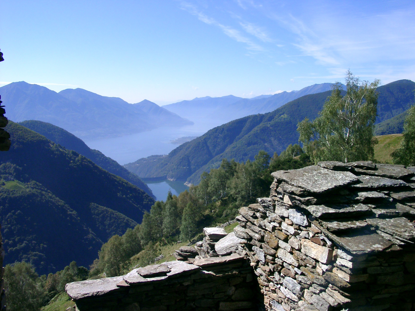 Auf der Alp Odro. Odro ist eine Alp und Rustici-Siedlung (1240 m.ü.M.) oberhalb von Vogorno im Tessiner Valle Verzasca. Von Odro aus bietet sich ein atemberaubender Ausblick auf die Tessinerberge und auf einen Teil des Lago Maggiore.